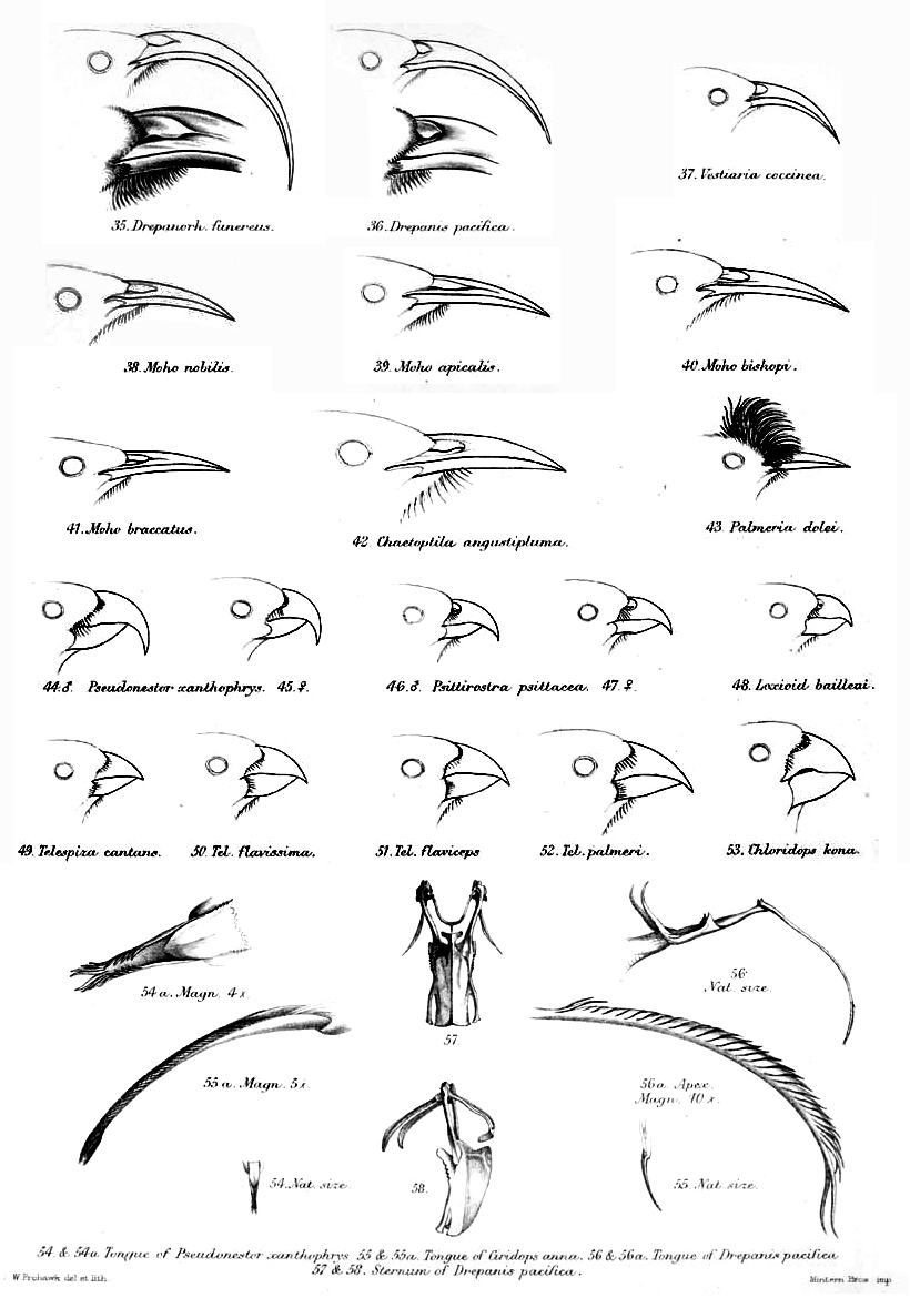 Schnäbel der Kleidervögel (Drepadinidae)